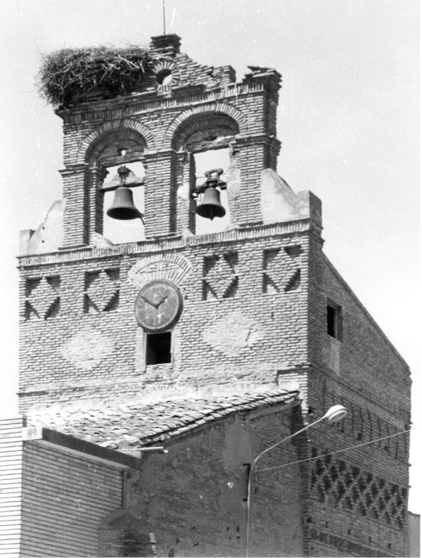 Iglesia Mozárabe Ribaforada